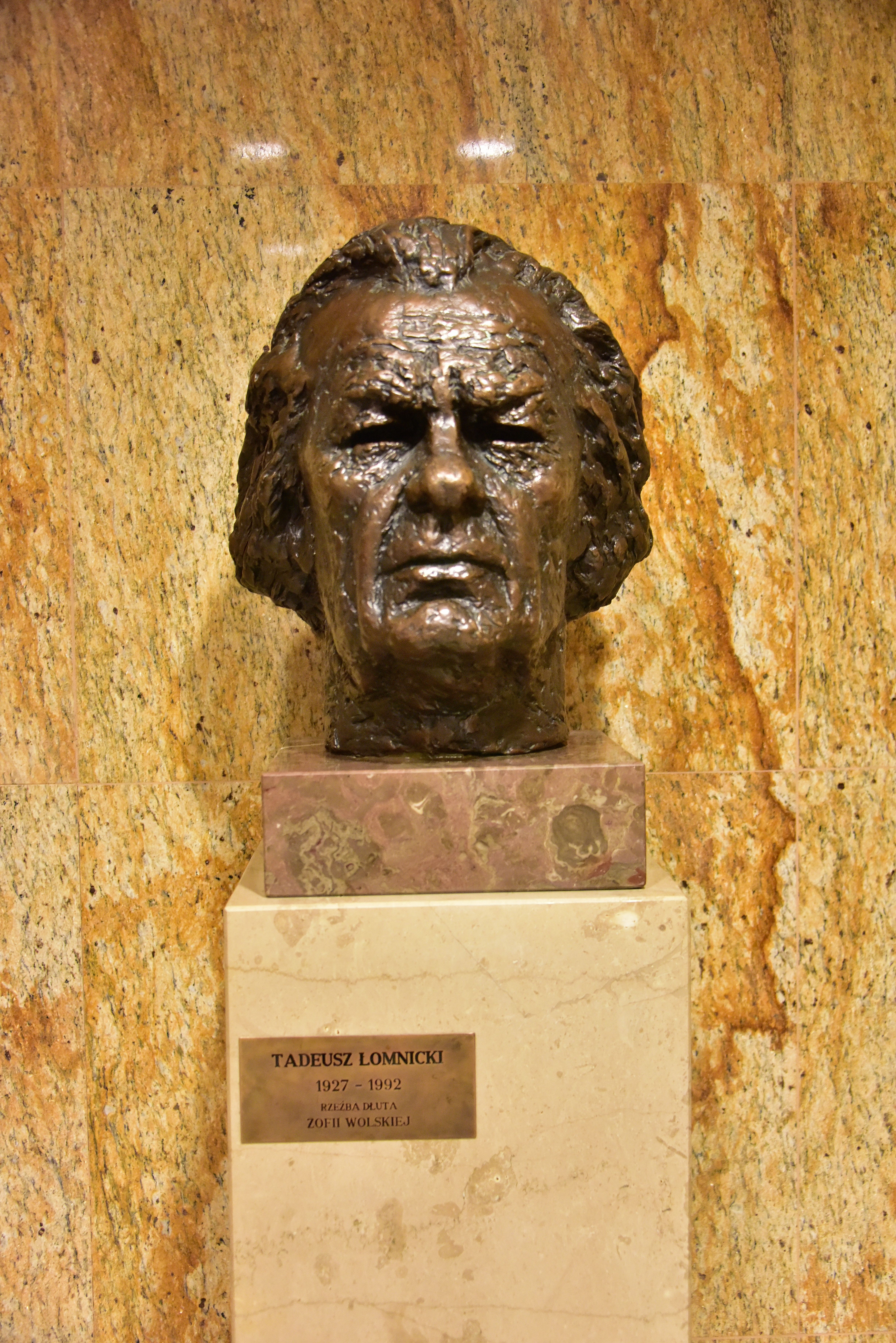 Teatr Dramatyczny m. st. Warszawy, Scena na Woli im. Tadeusza Łomnickiego. Głowa Tadeusza Łomnickiego w holu teatru